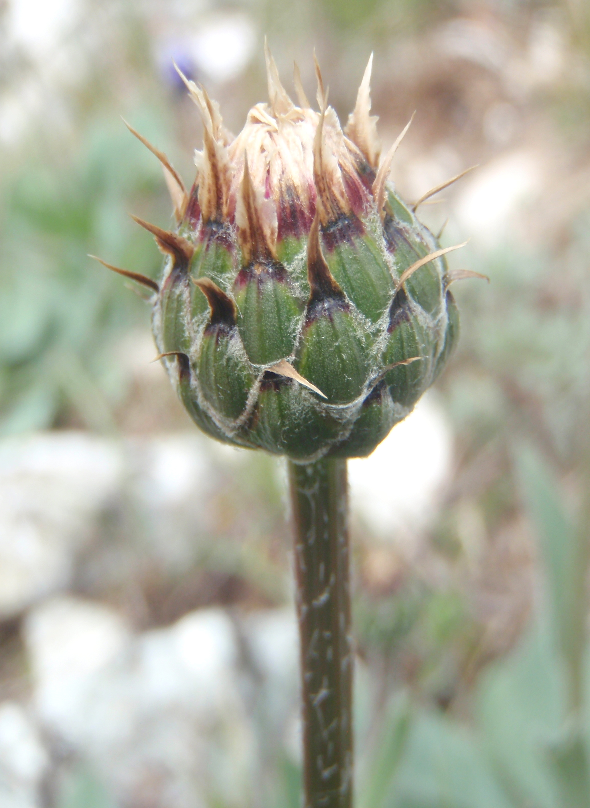 Klasea nudicaulis - Capítulo preantesis con brácteas involucrales de márgenes ciliados y tomentoso-lanudos. - Nans-les-Pins ( Departamento del Var, Francia)